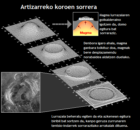 Artizarreko koroak (coronae) nola sortzen diren azaltzen duen irudia, xehetasun batzuekin.